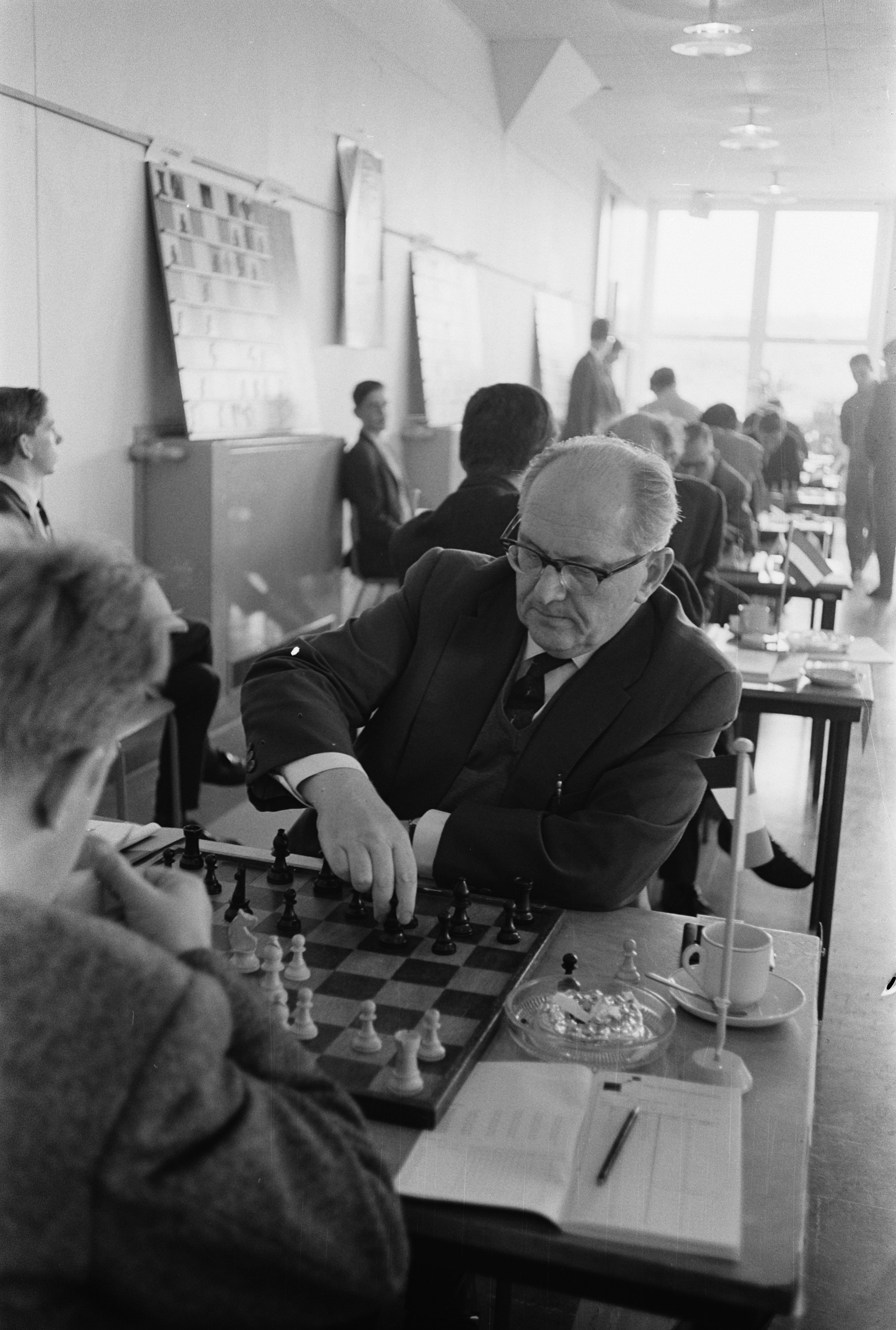 Collectie / Archief : Fotocollectie Anefo Reportage / Serie : [ onbekend ] Beschrijving : Derde IBM Meestertoernooi . Nummer 16 K. Bertok , 17.18 M. Czerniak Datum : 29 augustus 1963 Trefwoorden : Schaken Persoonsnaam : K. Bertok, M. Czerniak Fotograaf : Walta, Winfried / Anefo Auteursrechthebbende : Nationaal Archief Materiaalsoort : Negatief (zwart/wit) Nummer archiefinventaris : bekijk toegang 2.24.01.05 Bestanddeelnummer : 915-4869